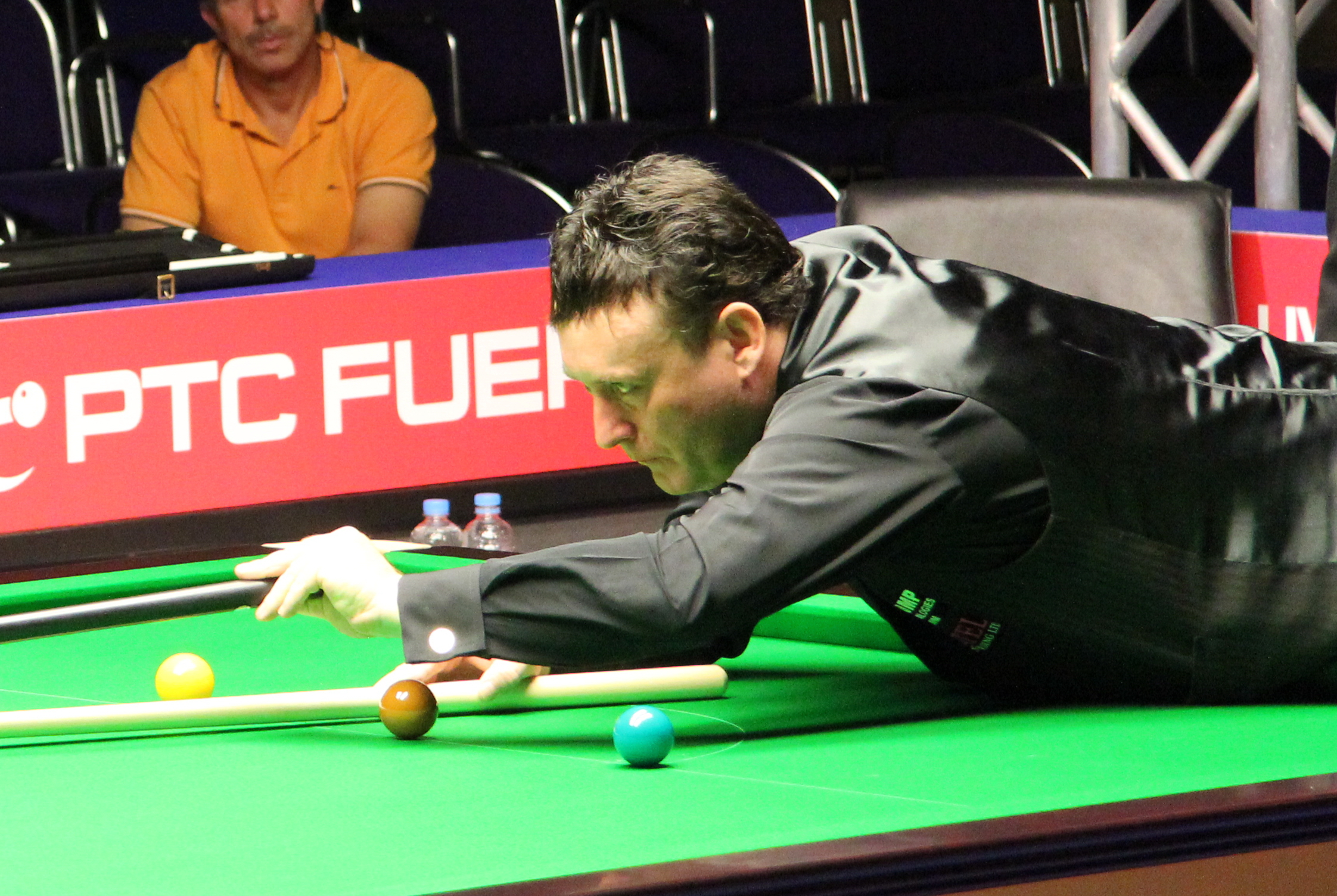 Jimmy White beim Paul Hunter Classic 2011